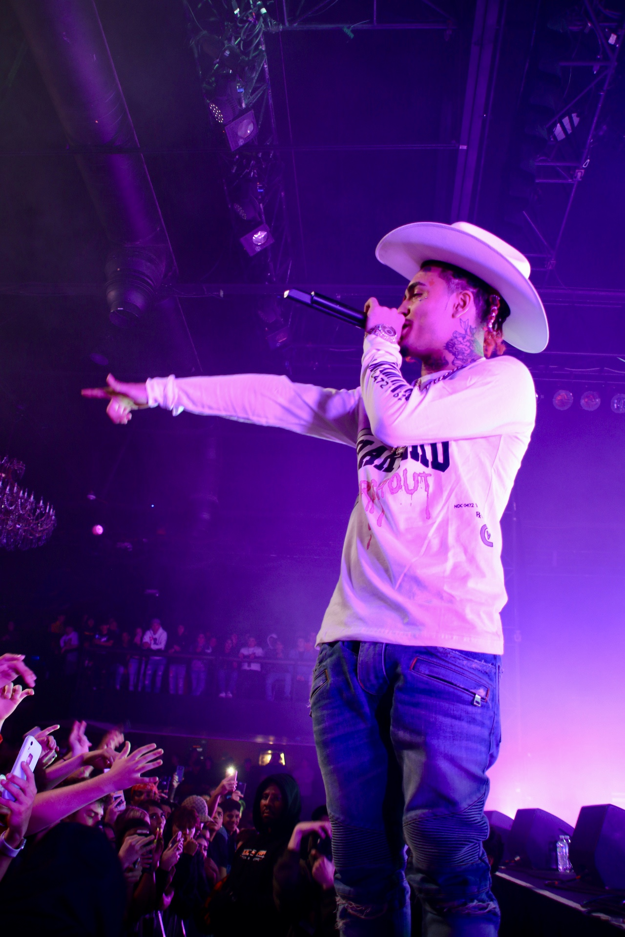 Lil Pump ::: Fillmore Auditorium ::: 05.01.19